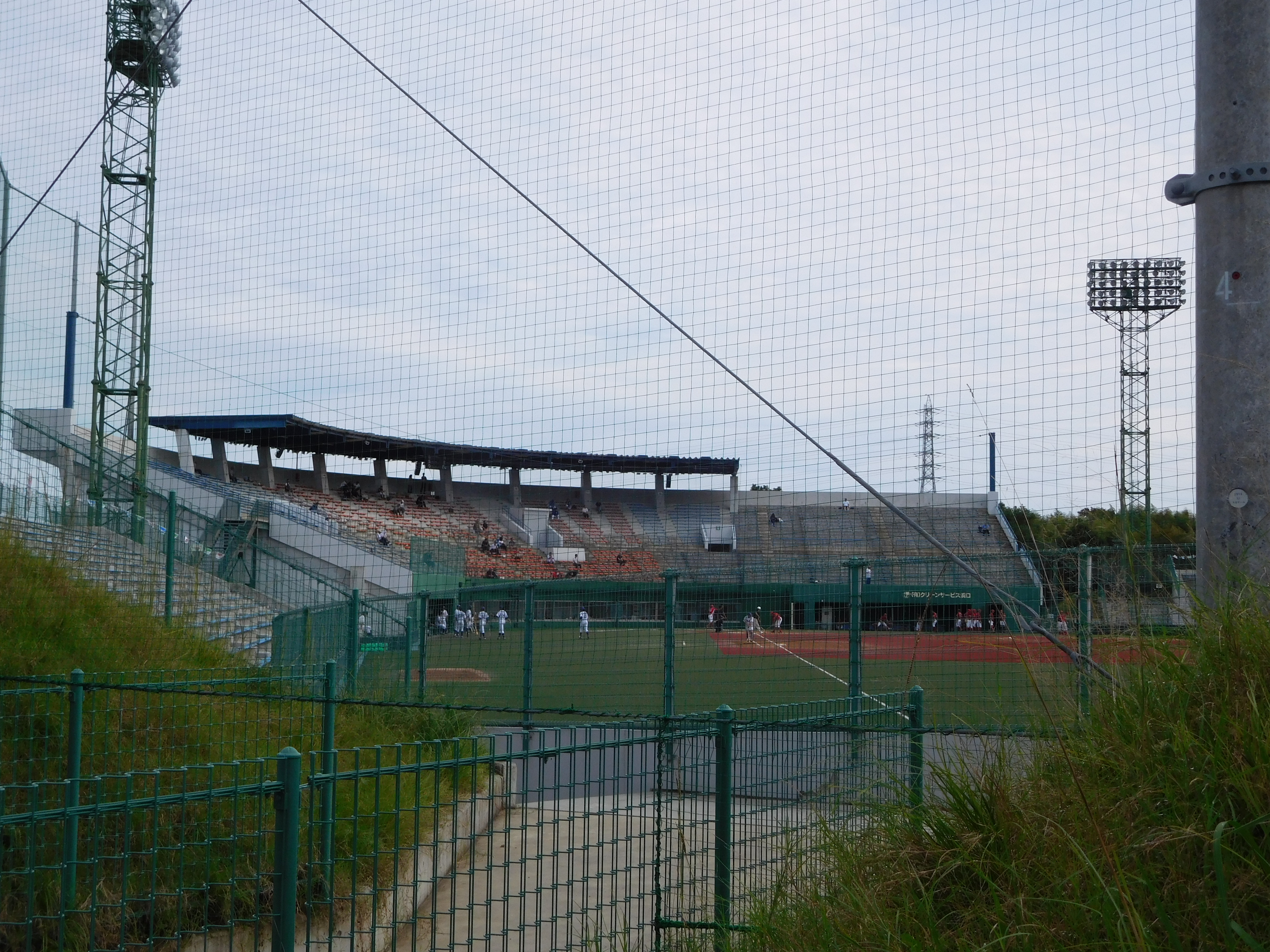 2016年のJABA伊勢・松阪大会、10月4日フェデックス対トヨタ自動車（伊勢市倉田山公園野球場）の試合の様子。